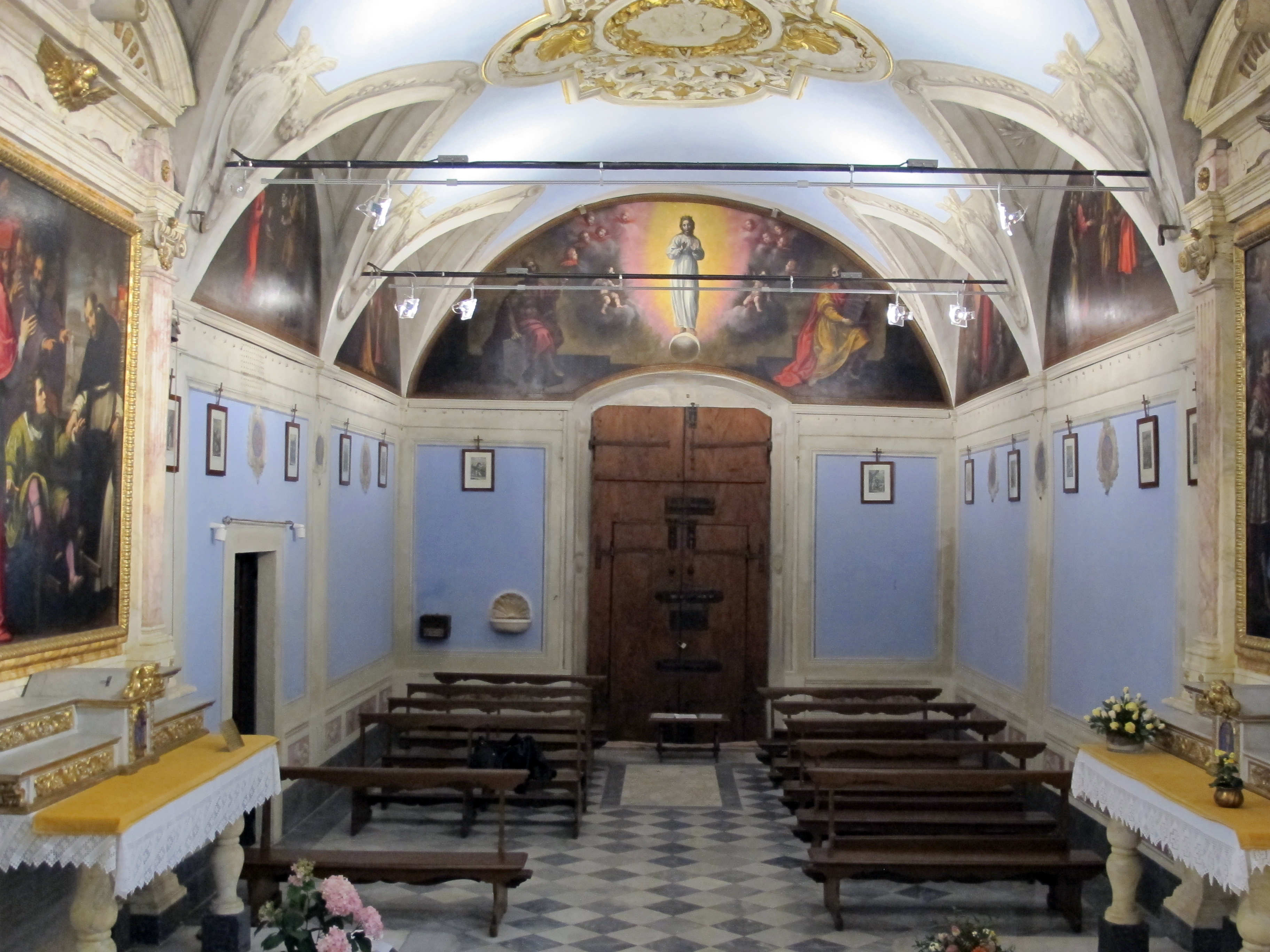 Santa maria degli angiolini, interno